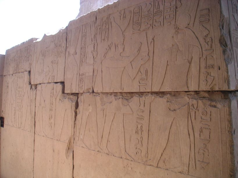 Paroi décorée de relief réinscrits au nom de Sobekemsaf Ier (Sekhem-Rê-ouadj-khâou) provenant du temple de Montou à Médamoud - XVIIe dynastie égyptienne - Musée en plein air de Karnak